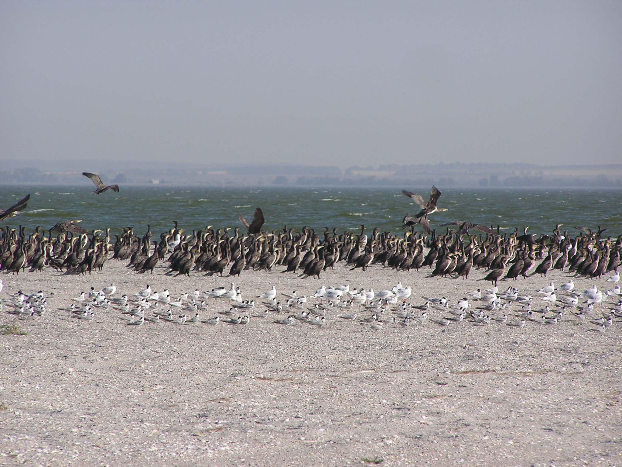 Большой баклан, Phalacrocorax carbo (Linnaeus, 1758), сфотографировано на Белосарайской косе в конце августа 2007